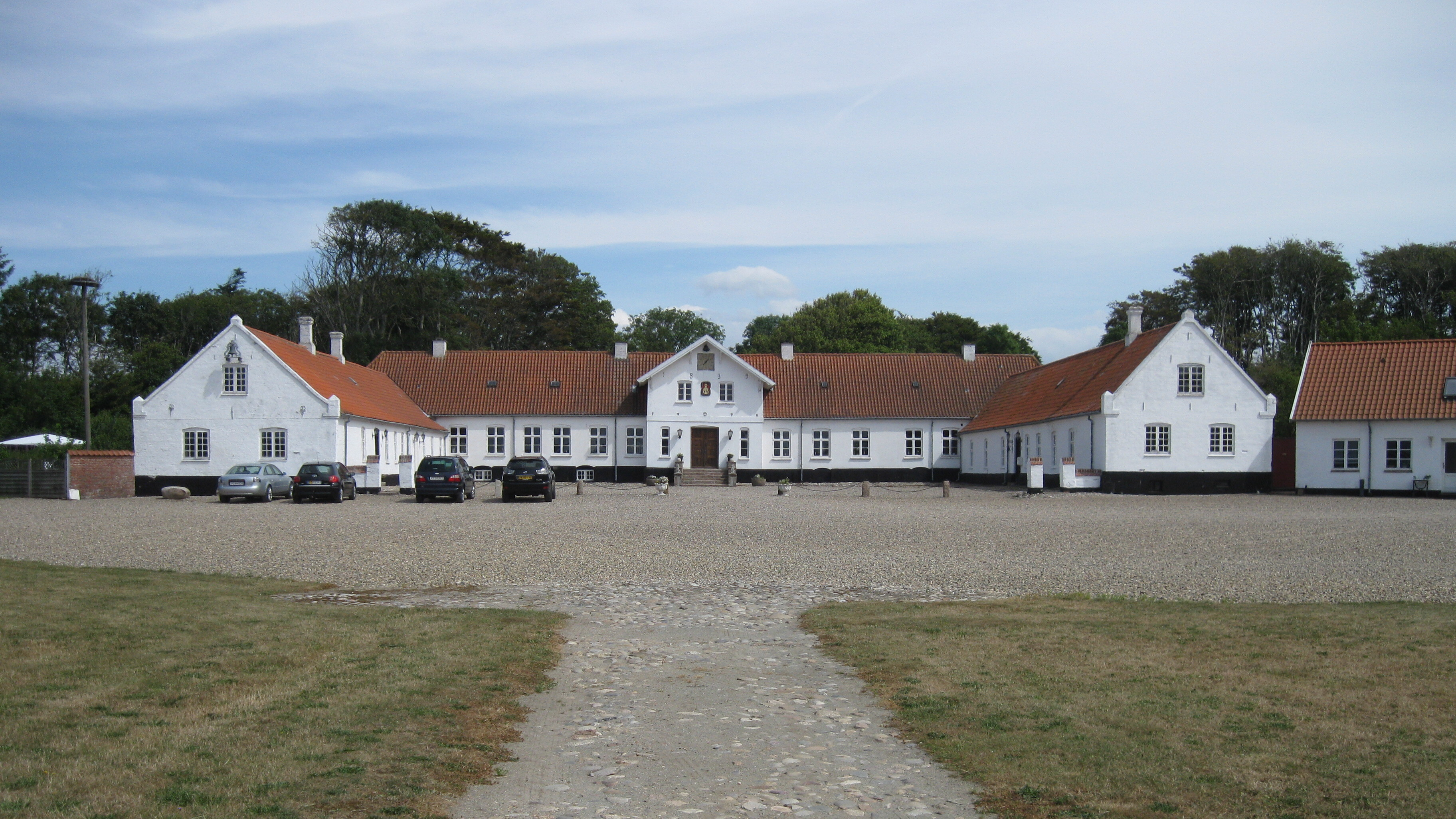 Lønborggård